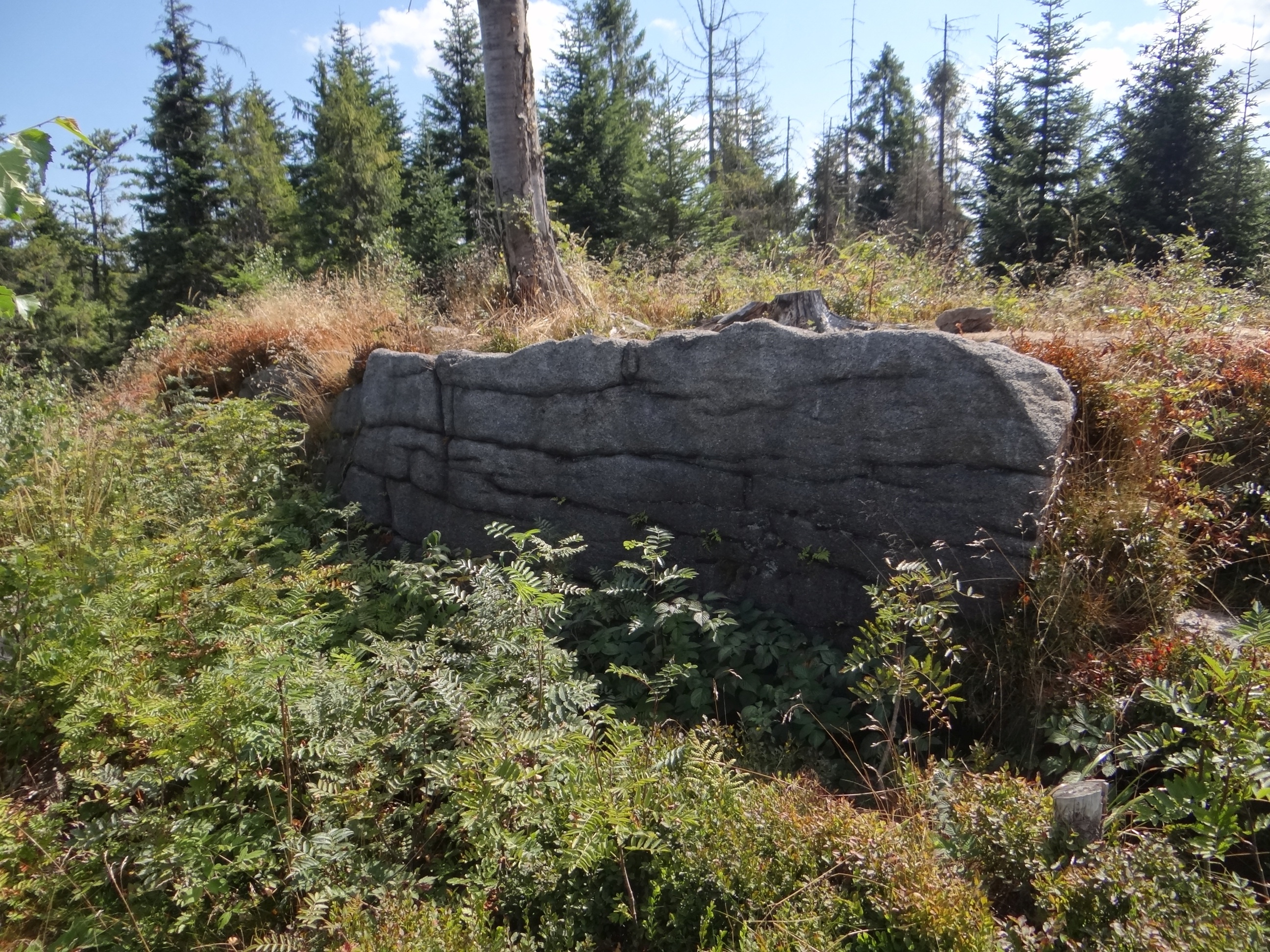 Skałki na grzbiecie Smrekowicy